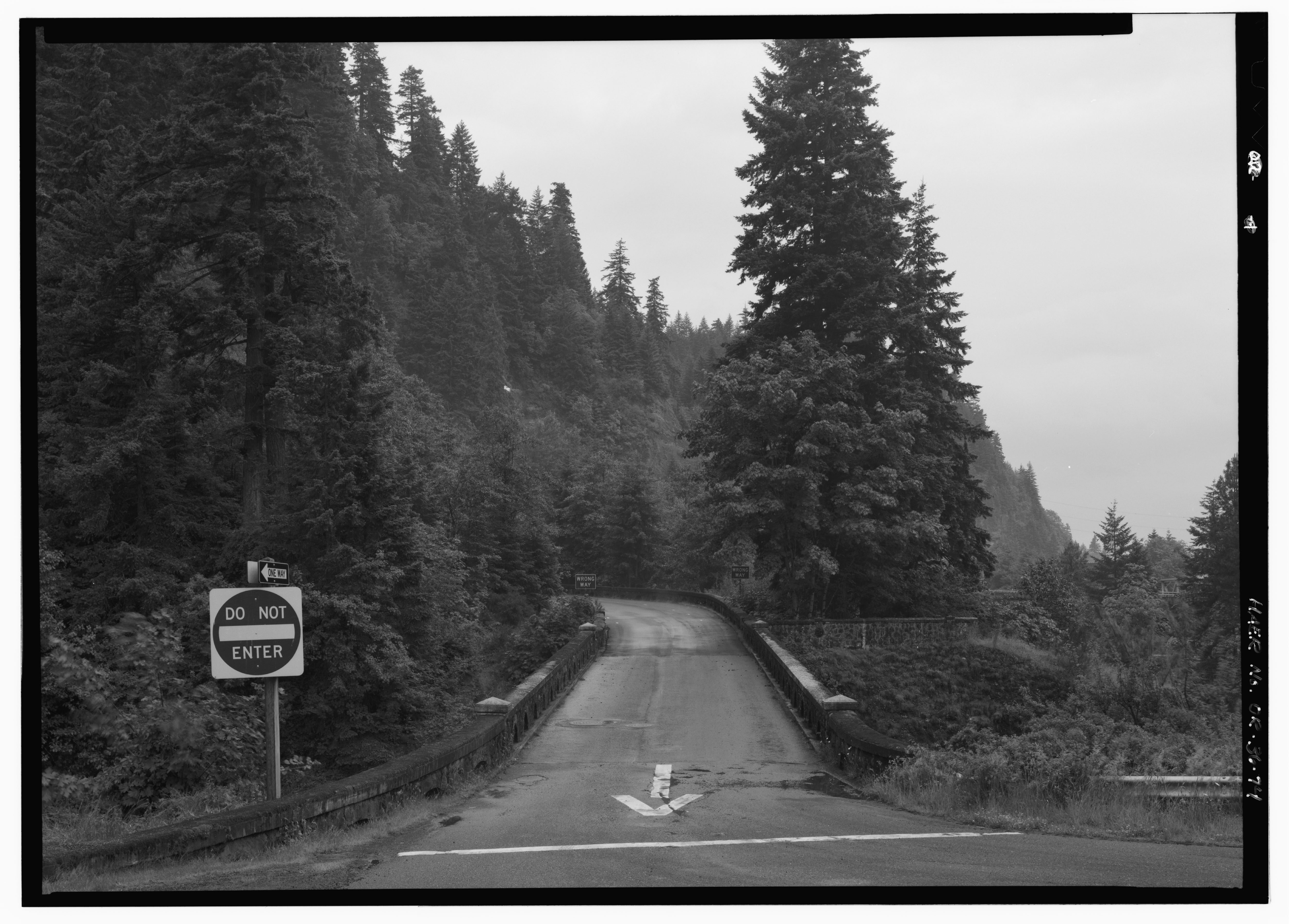 EAGLE CREEK BRIDGE, VIEW OF NORTH END LOOKING 222 DEGREES SOUTHWEST. SCENIC VIEW AREA VISIBLE AT REAR OF RIGHT SIDE OF BRIDGE.